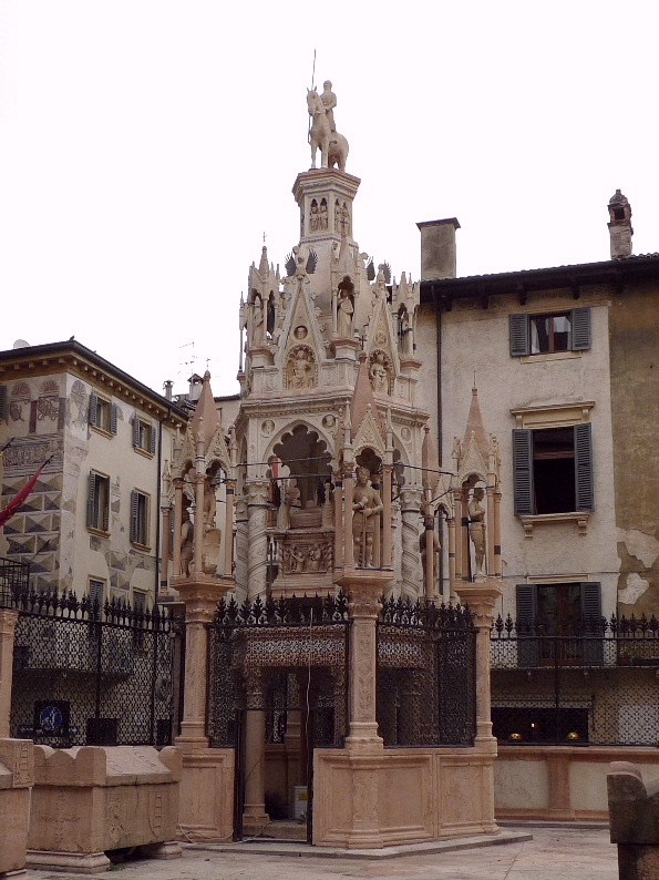 Scaliger-Grabstätte (neben der Kirche Santa Maria Antica) in Verona